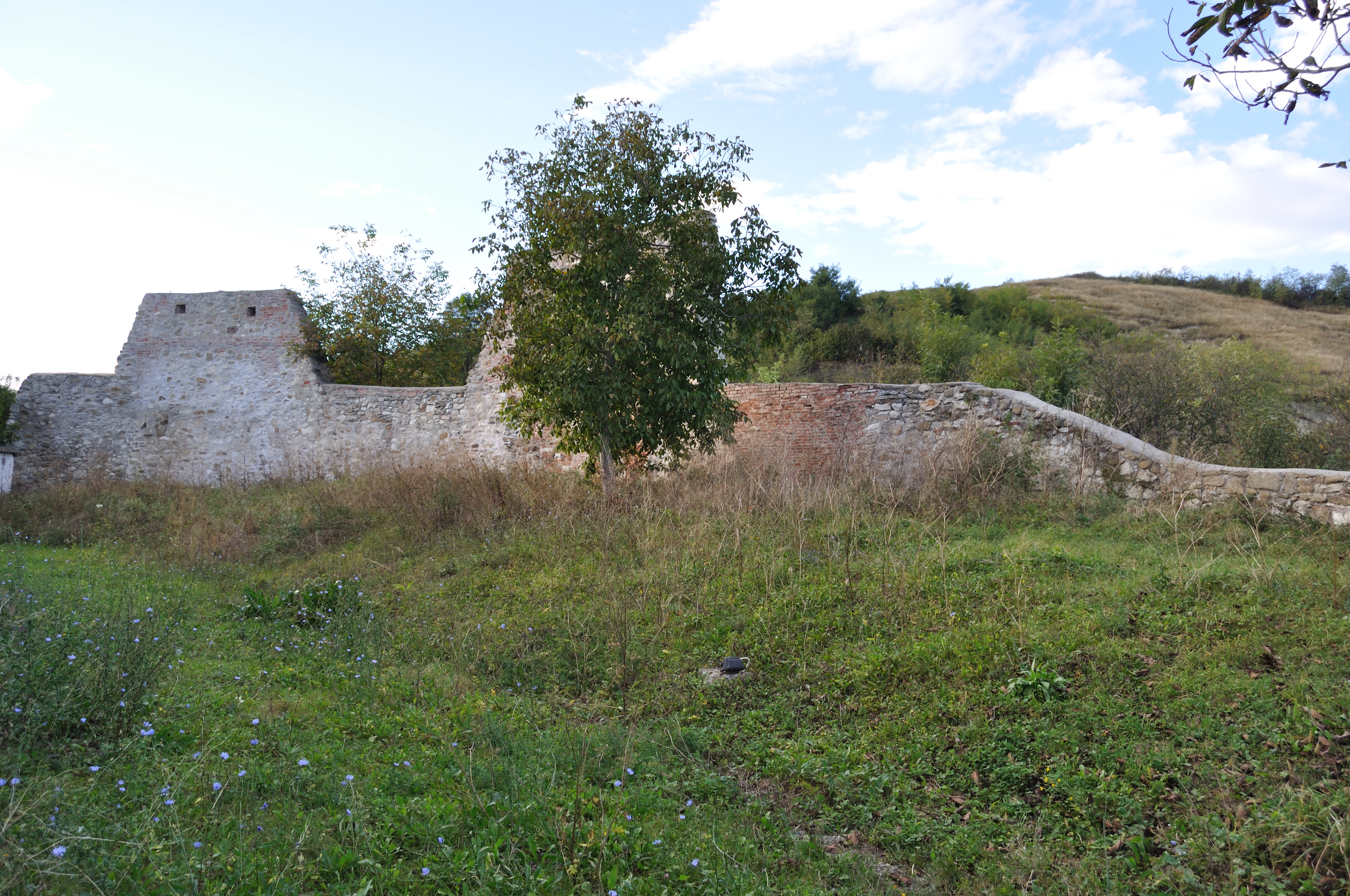 Biserica fortificată din Cenade, Alba